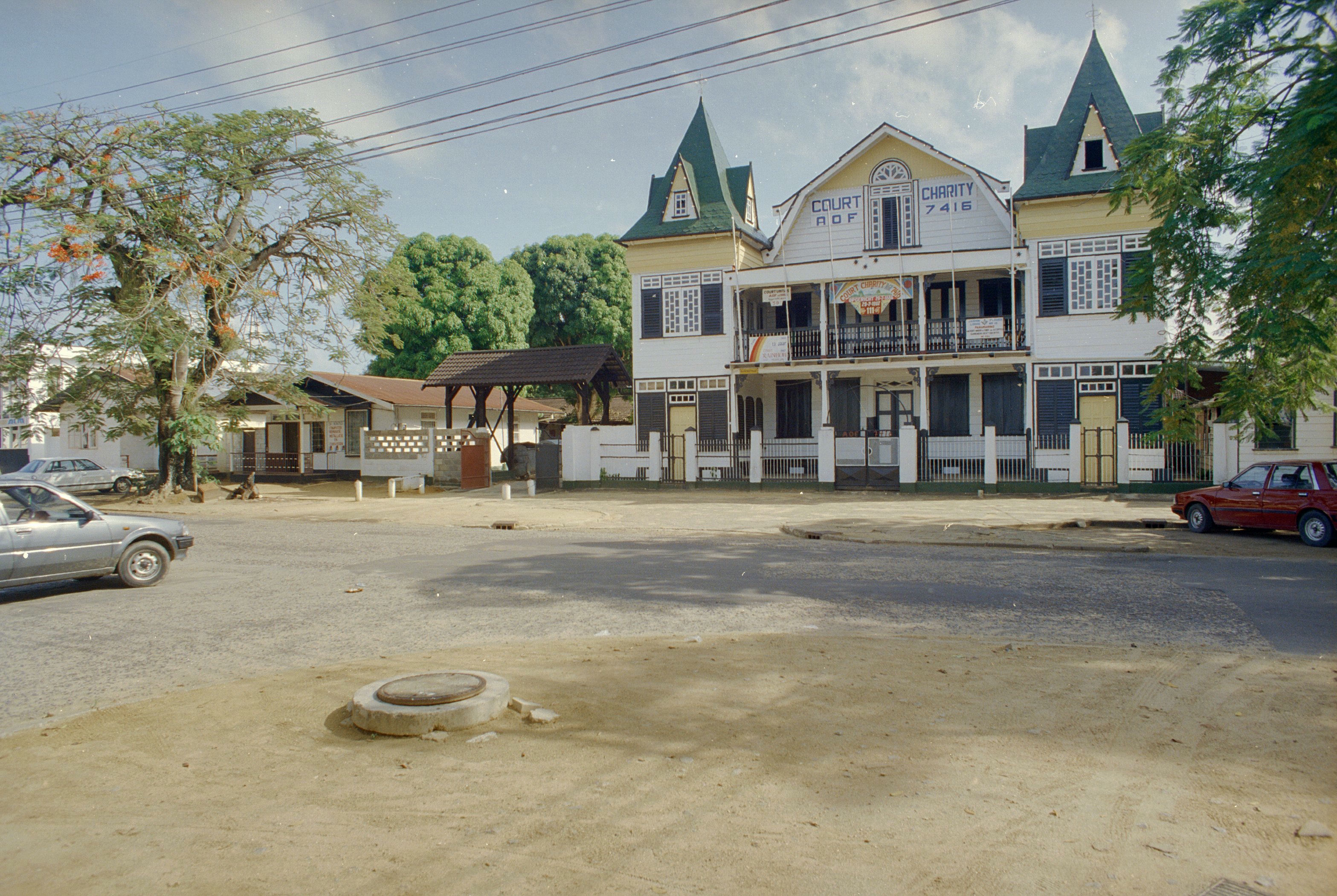 Court Humanitas: Overzicht voorgevel (opmerking: Suriname Reis Loek Tangel)